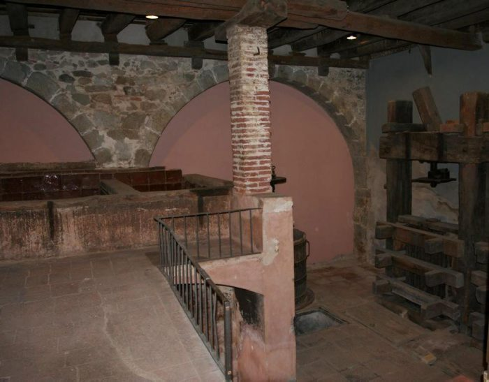 Celler